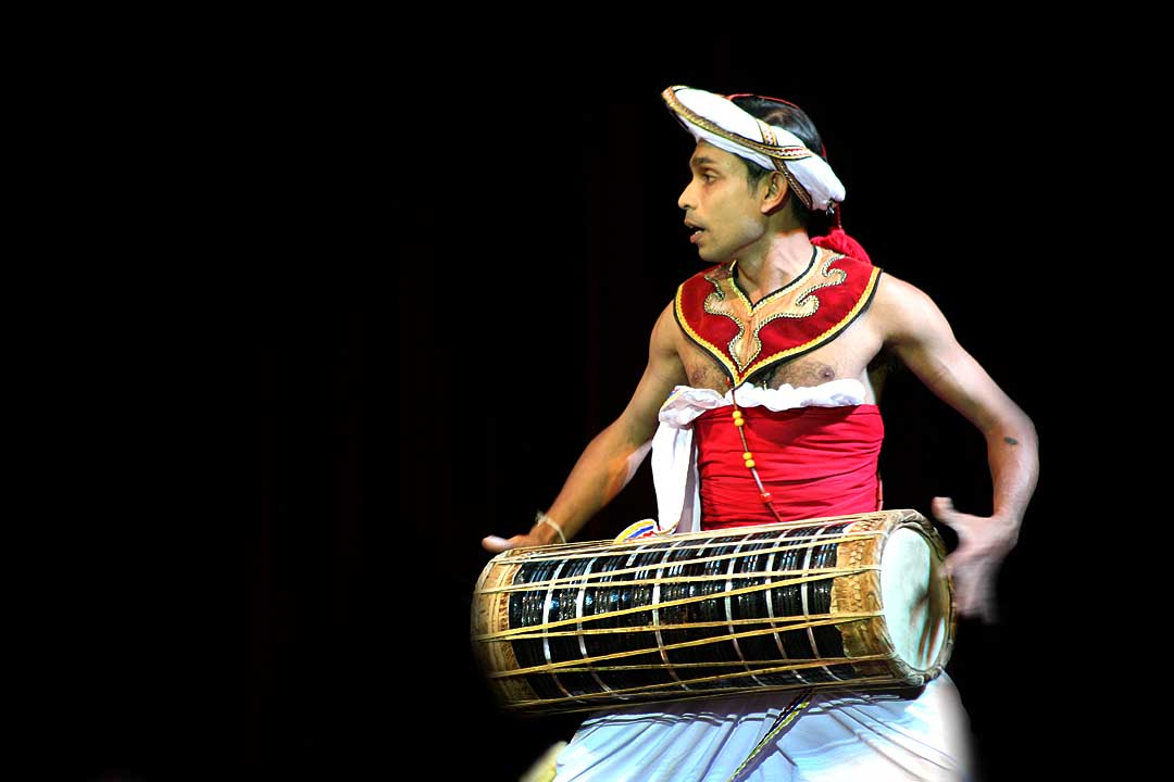 Sri Lanka Traditional Drum